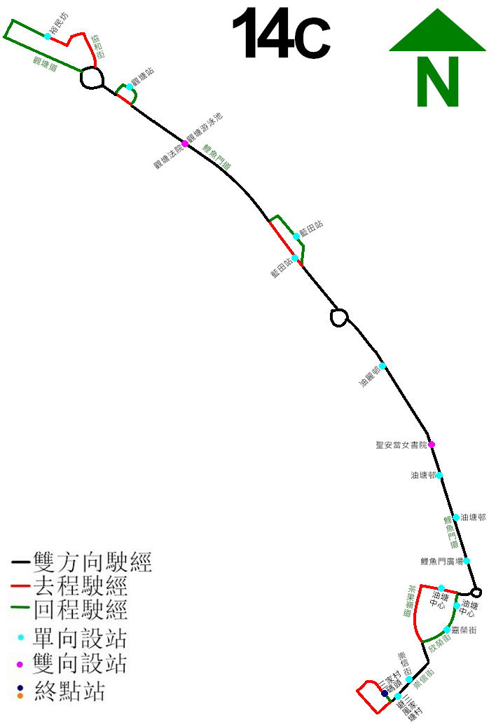 中文（香港）: 九巴14C線取消前的走線圖